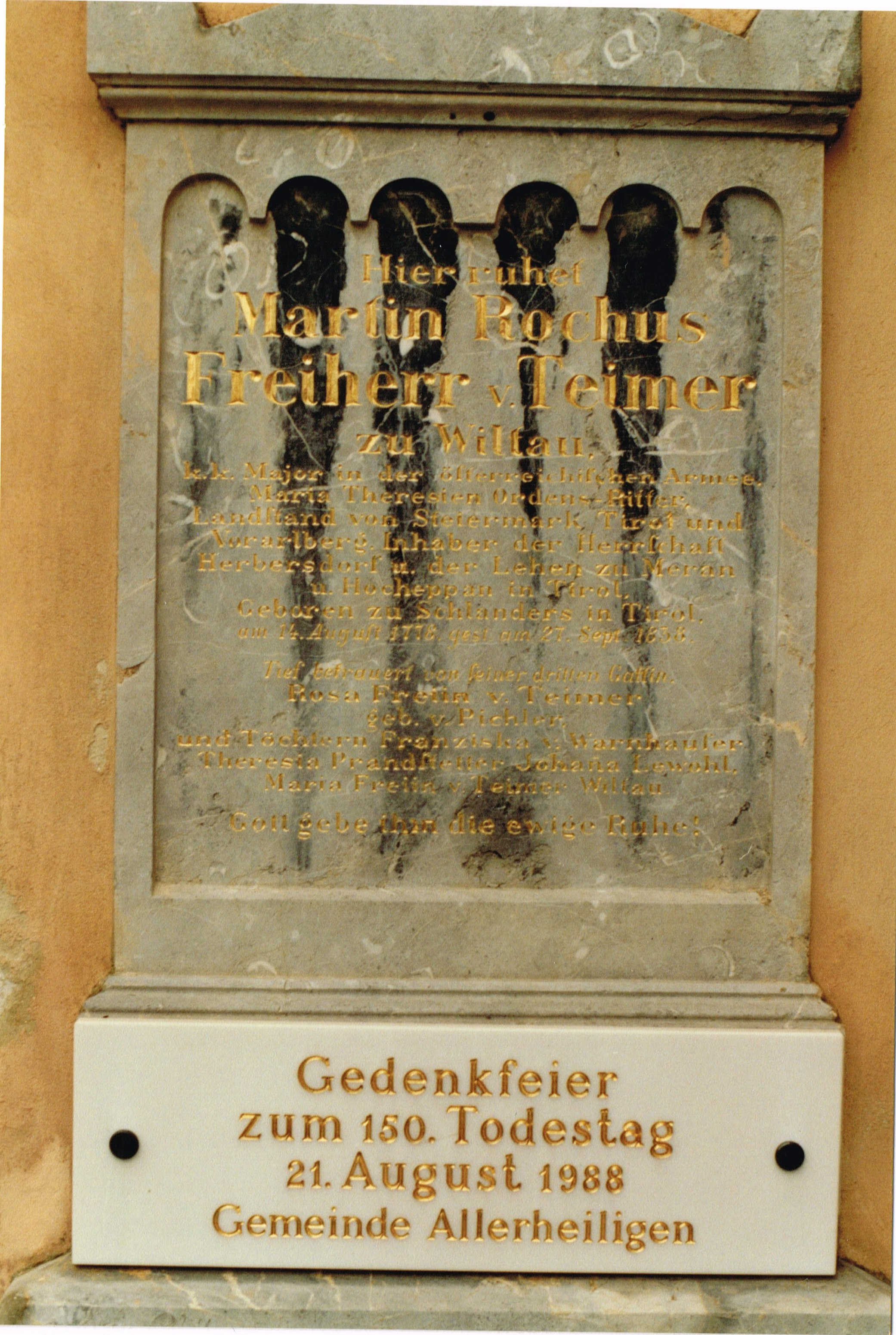 Grabmal Martin Rochus Teimer (1778–1838), Tiroler Freiheitskämpfer und Maria Theresia Ordensritter, an der Pfarrkirche zu Allerheiligen bei Wildon